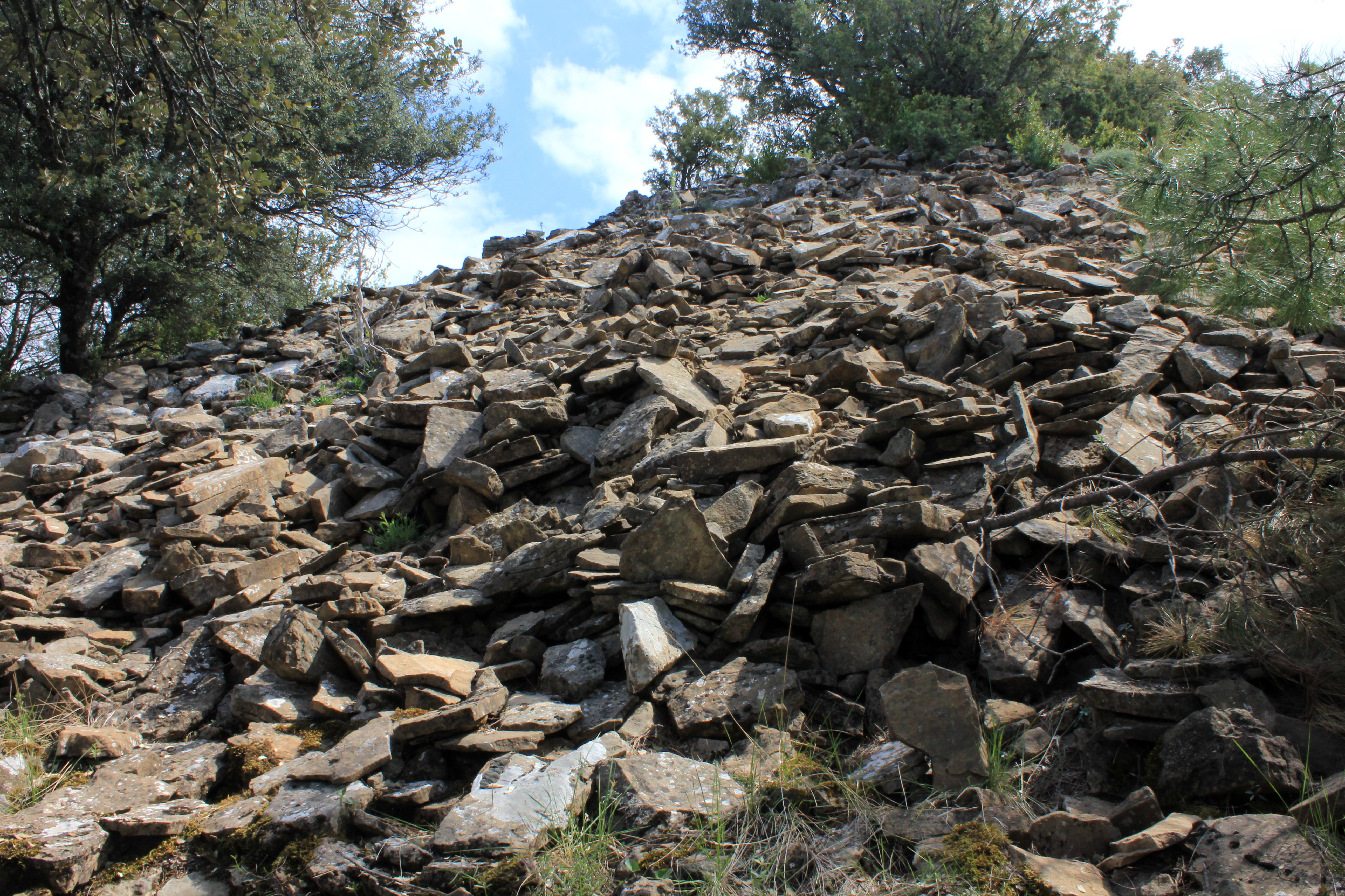 Aragonés: As enrunas d'o Castiello de Tou.